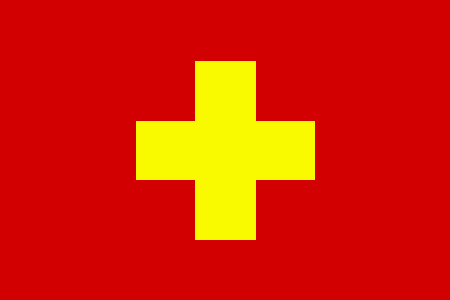 Bandiera del Comune di Ancona.